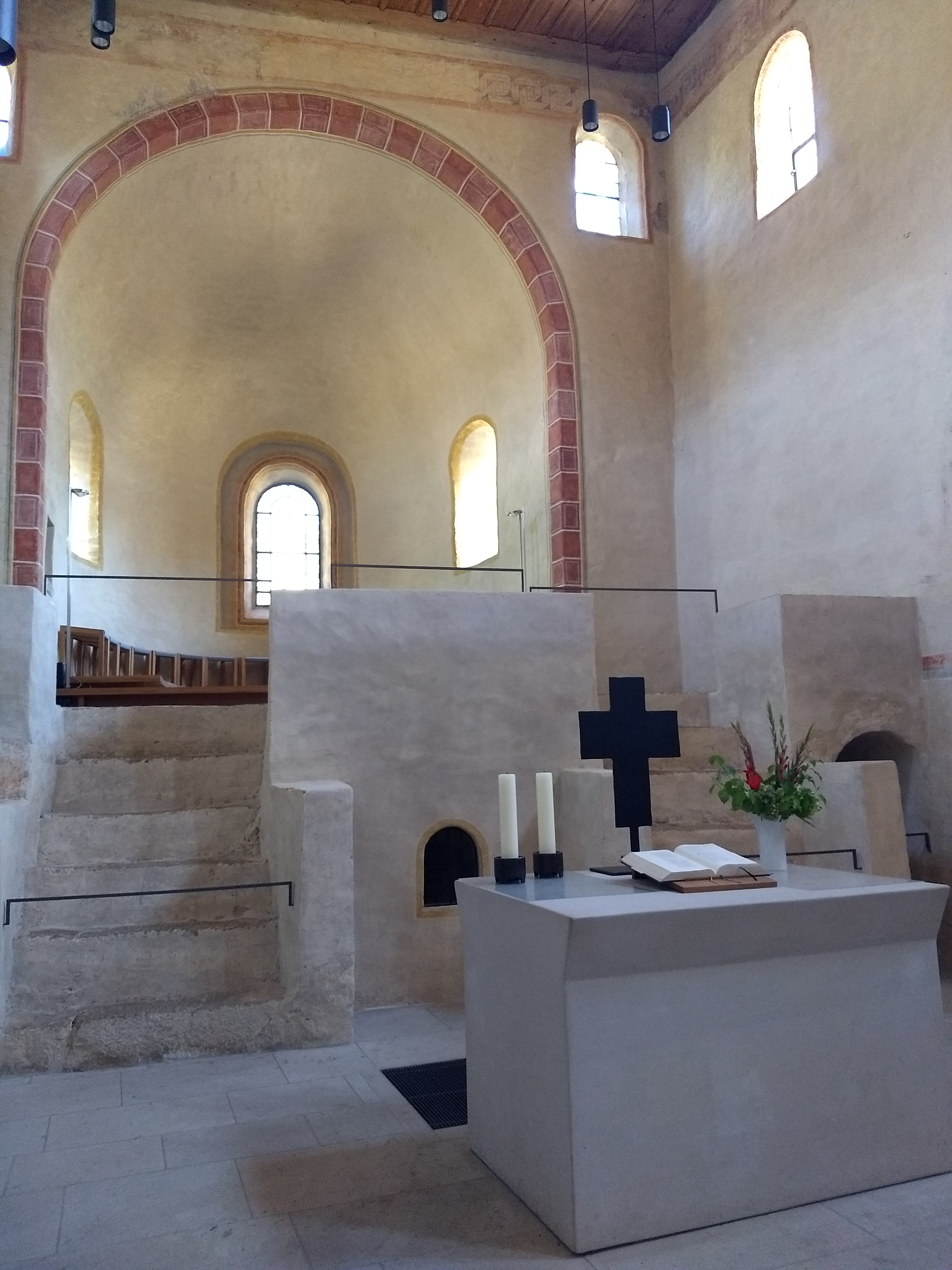 Die dem römischen Märtyrer St. Cyriak geweihte frühromanische evangelische Pfarrkirche St. Cyriak in Sulzburg zählt mit über 1000 Jahren zu den ältesten Kirchen Deutschlands. Sie war die Klosterkirche des Klosters Sulzburg.